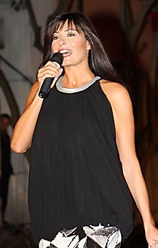 Ilaria D'Amico